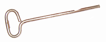 Clé ouvre-boîte ouvre-boîte conserve